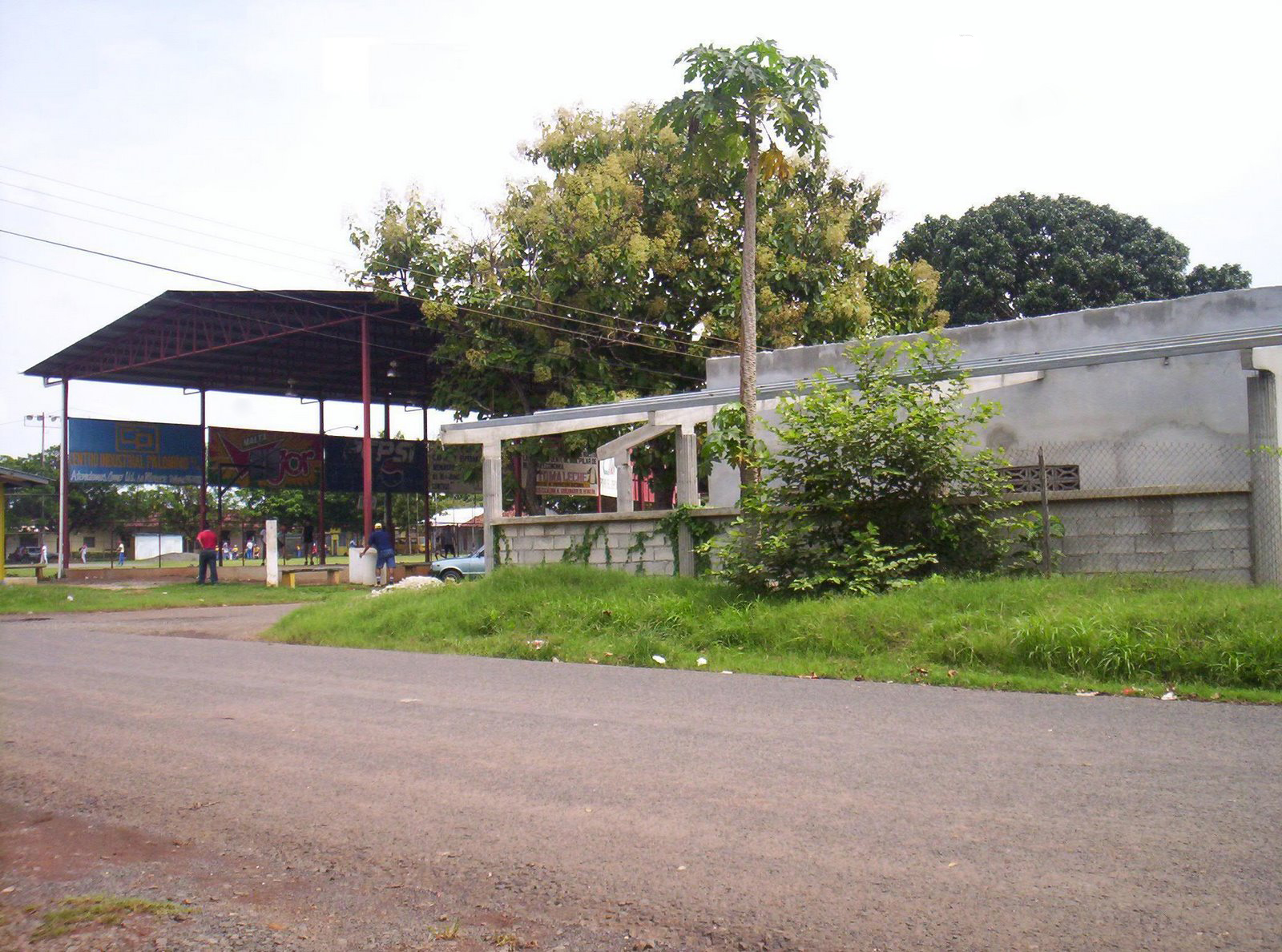 Complejo deportivo de Llano Bonito